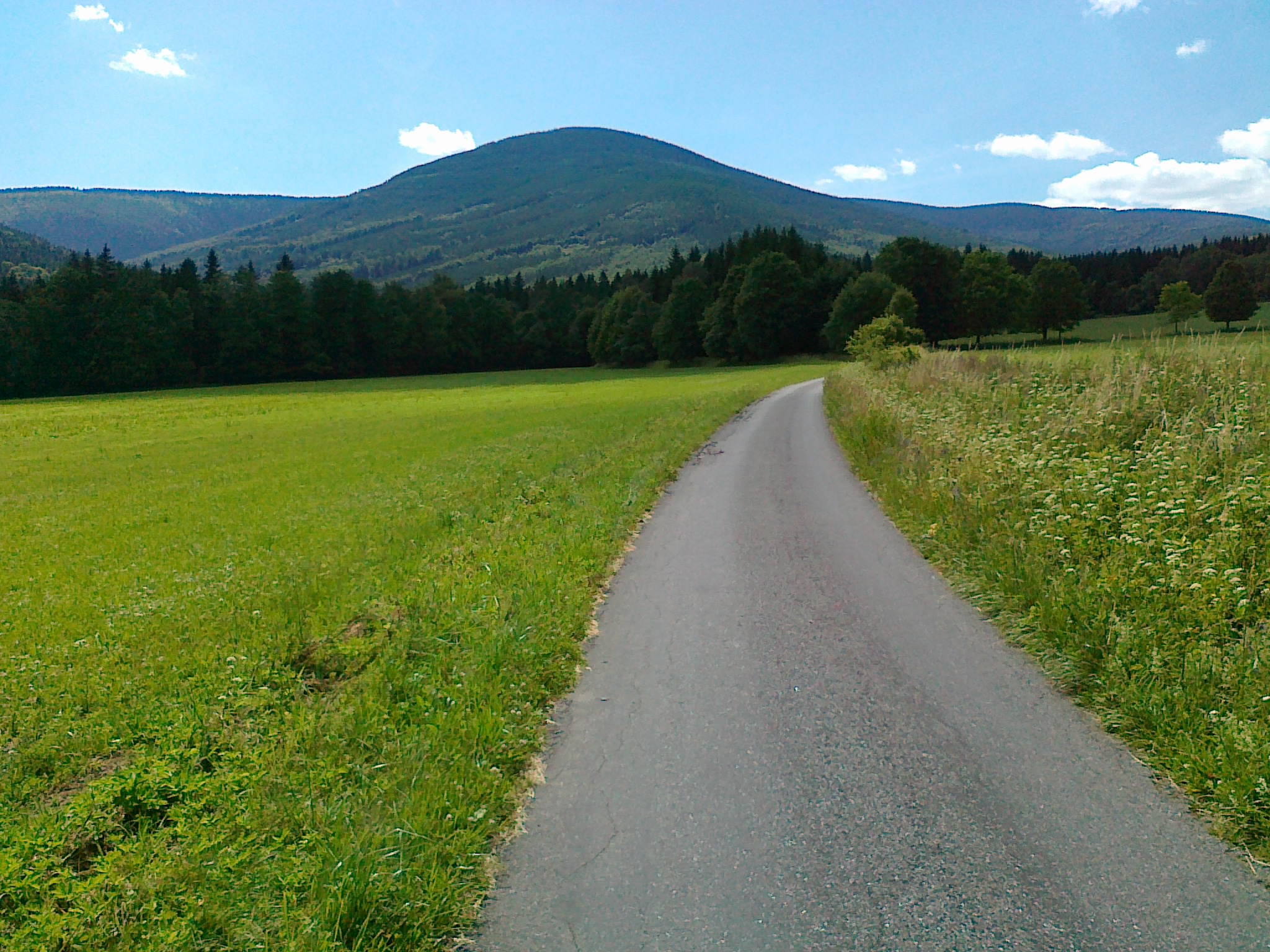 Widok z czerwonego szlaku rowerowego nr 6207 na górę Žalostná - 1351 m n.p.m.